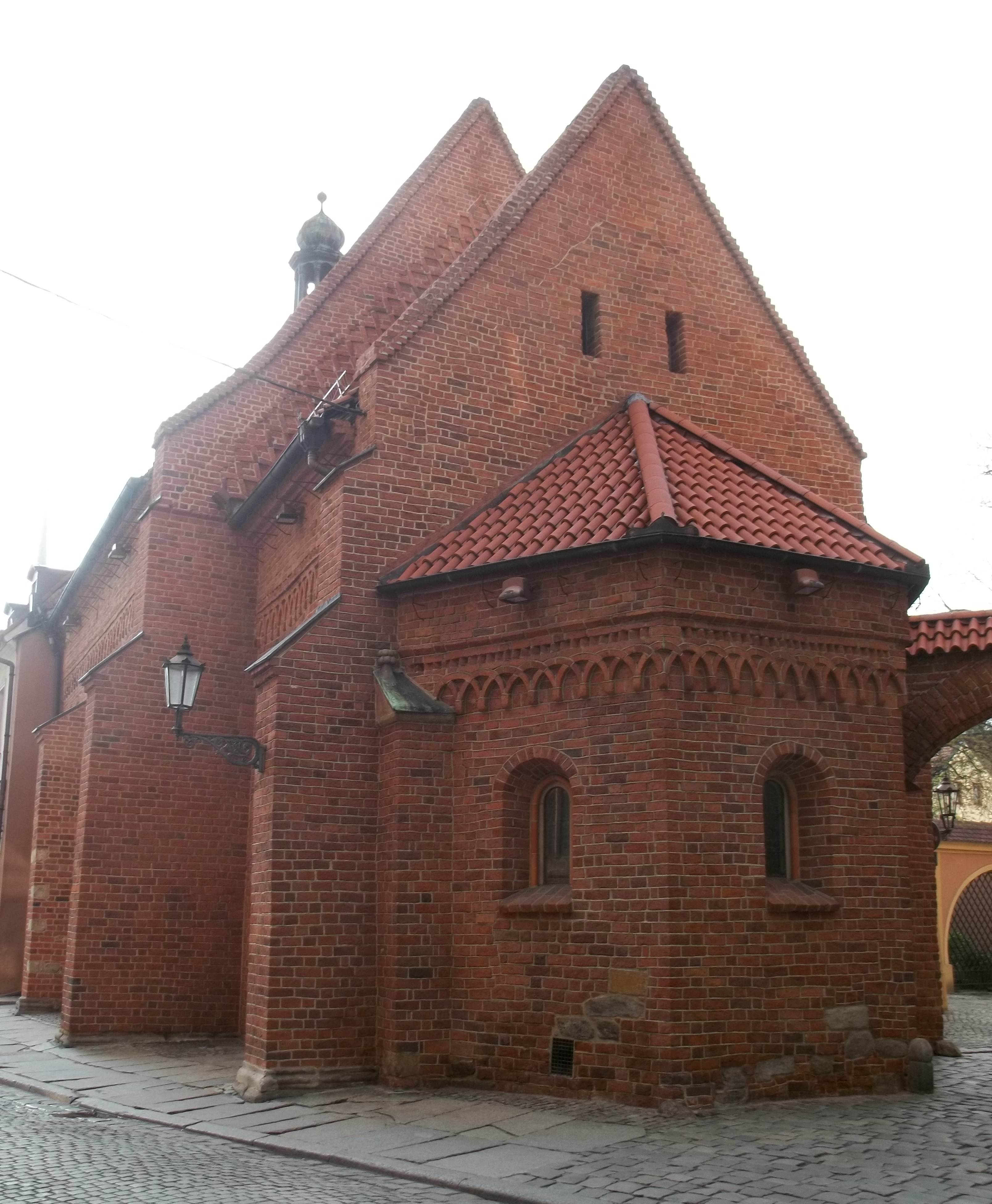 Kościół Św. Idziego we Wrocławiu